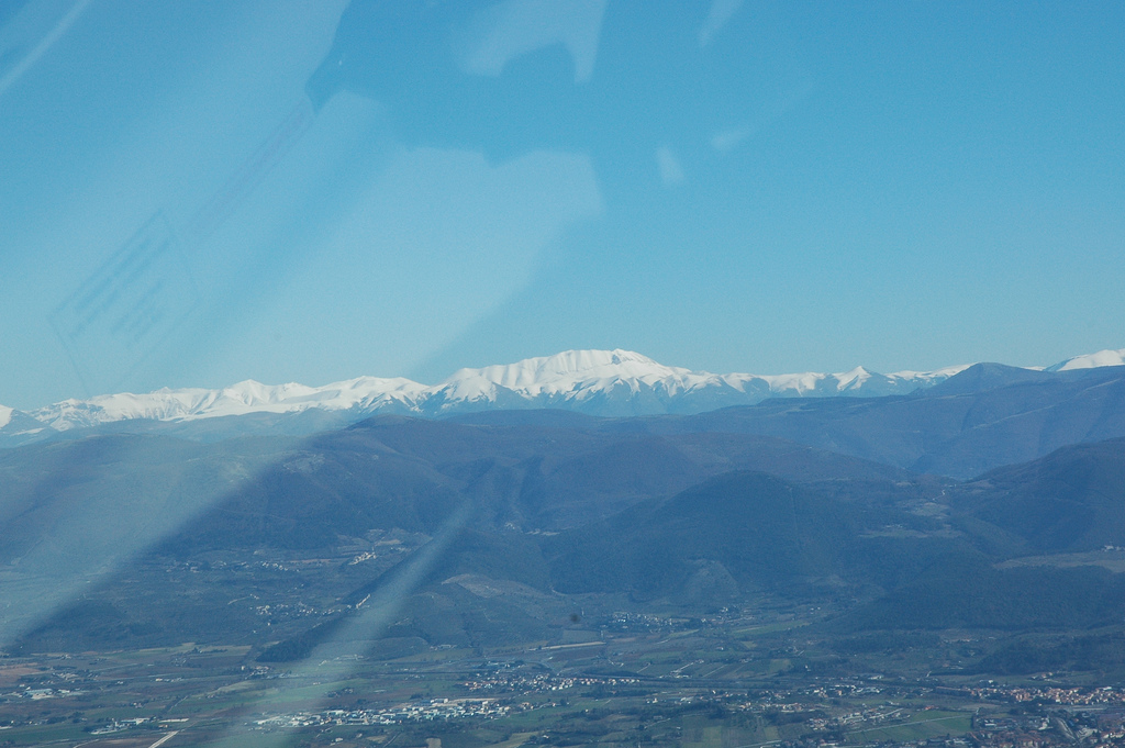 Monti Sabini settentrionali al confine tra Umbria e Lazio, sullo sfondo gli appennini innevati.